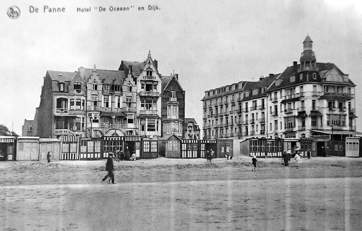 L'Hôtel l'Océan.